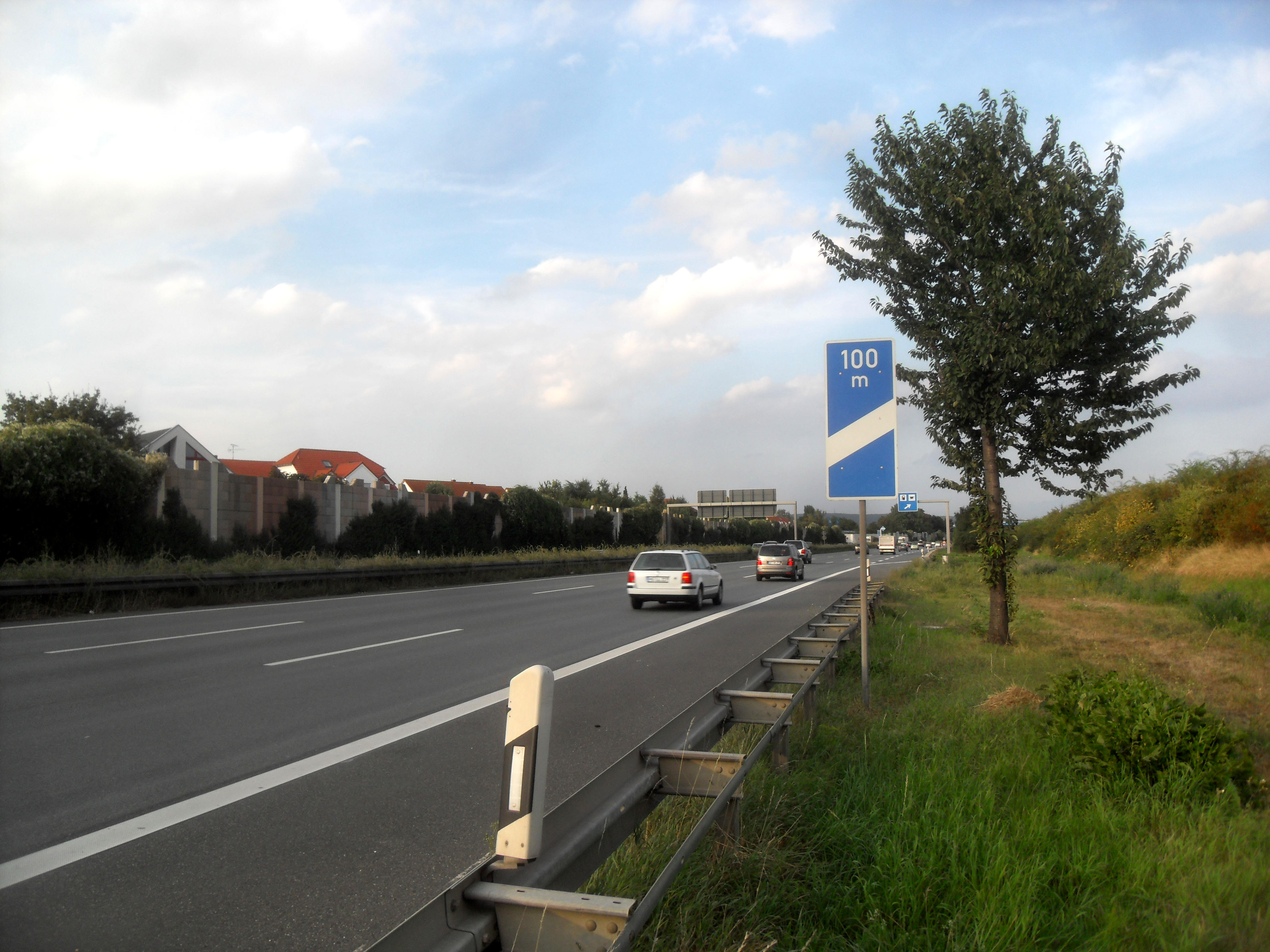 Die Bundesautobahn 66 (Abschnitt Rhein-Main-Schnellweg) in der Nähe von Wiesbaden-Erbenheim in Hessen (Deutschland)